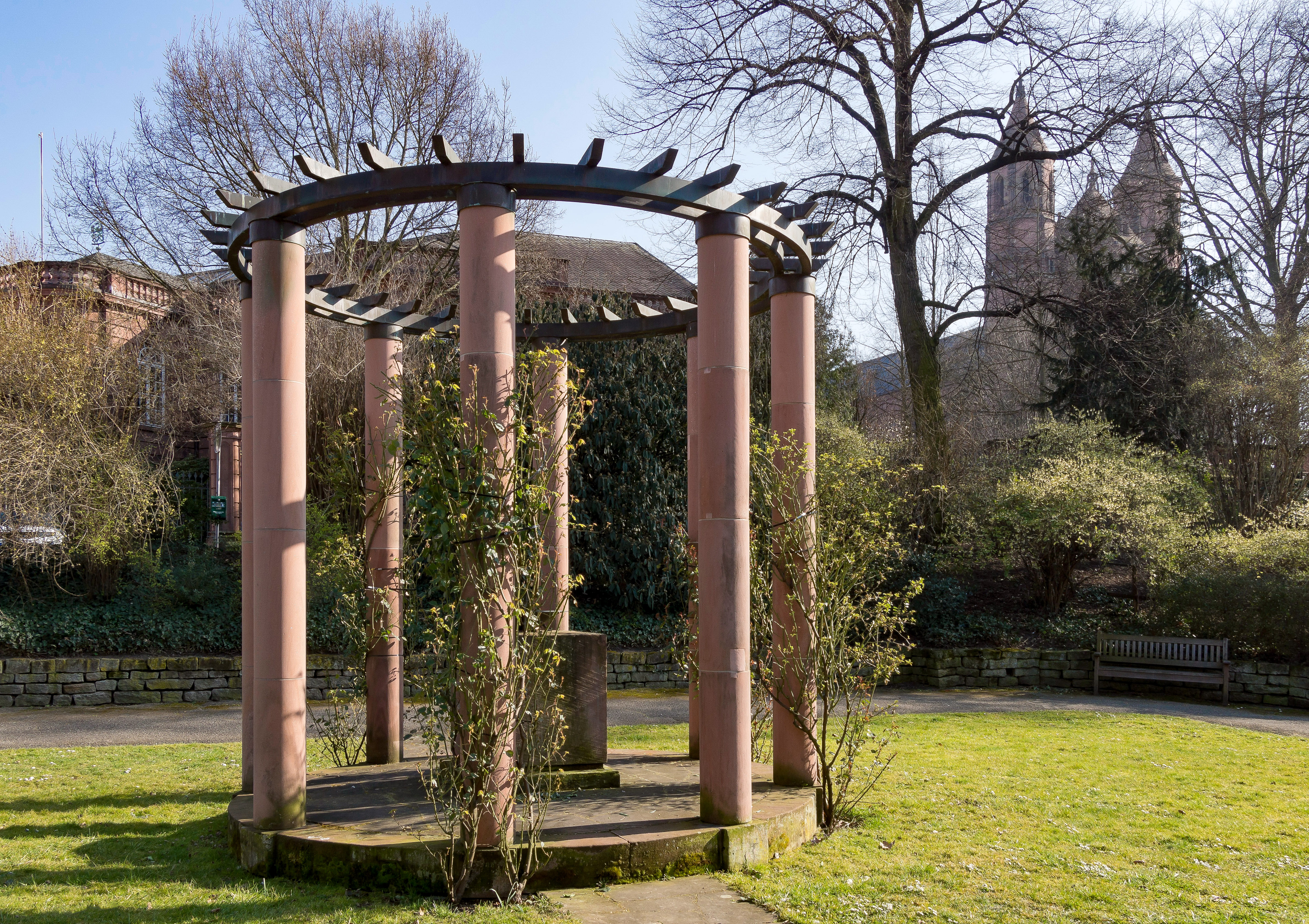 Worms, Mahnmal für die Opfer des Faschismus, Lutherring, kreisförmige Säulenstellung, Kubus mit Bronzeschale, 1950